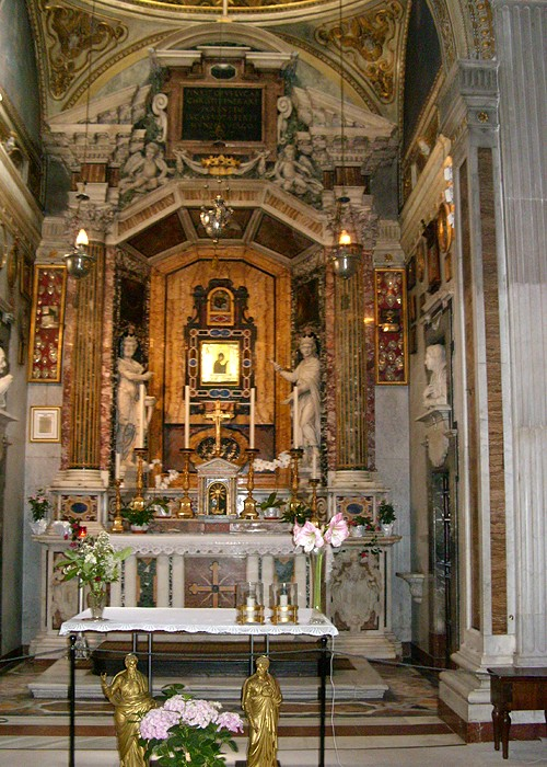 Spoleto - Duomo (Cappella della Ss. Icone)